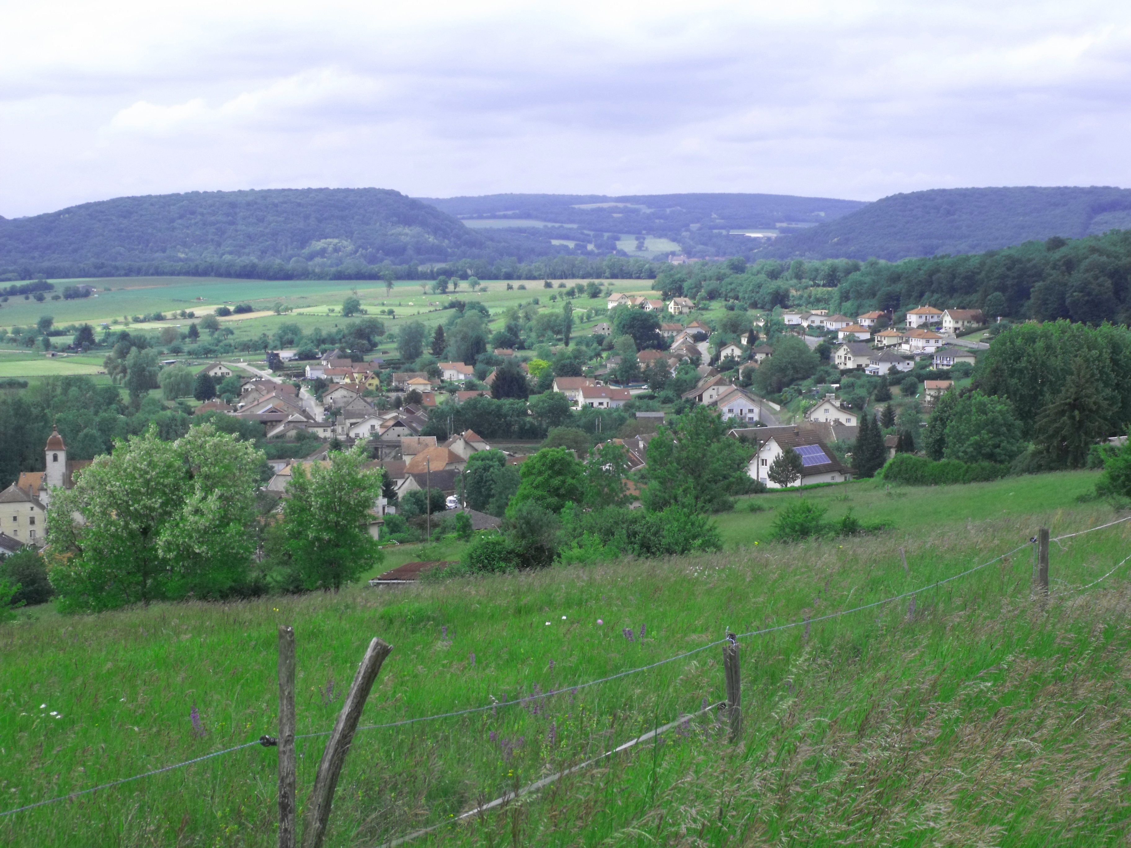 Panorama de Rang, Doubs, France